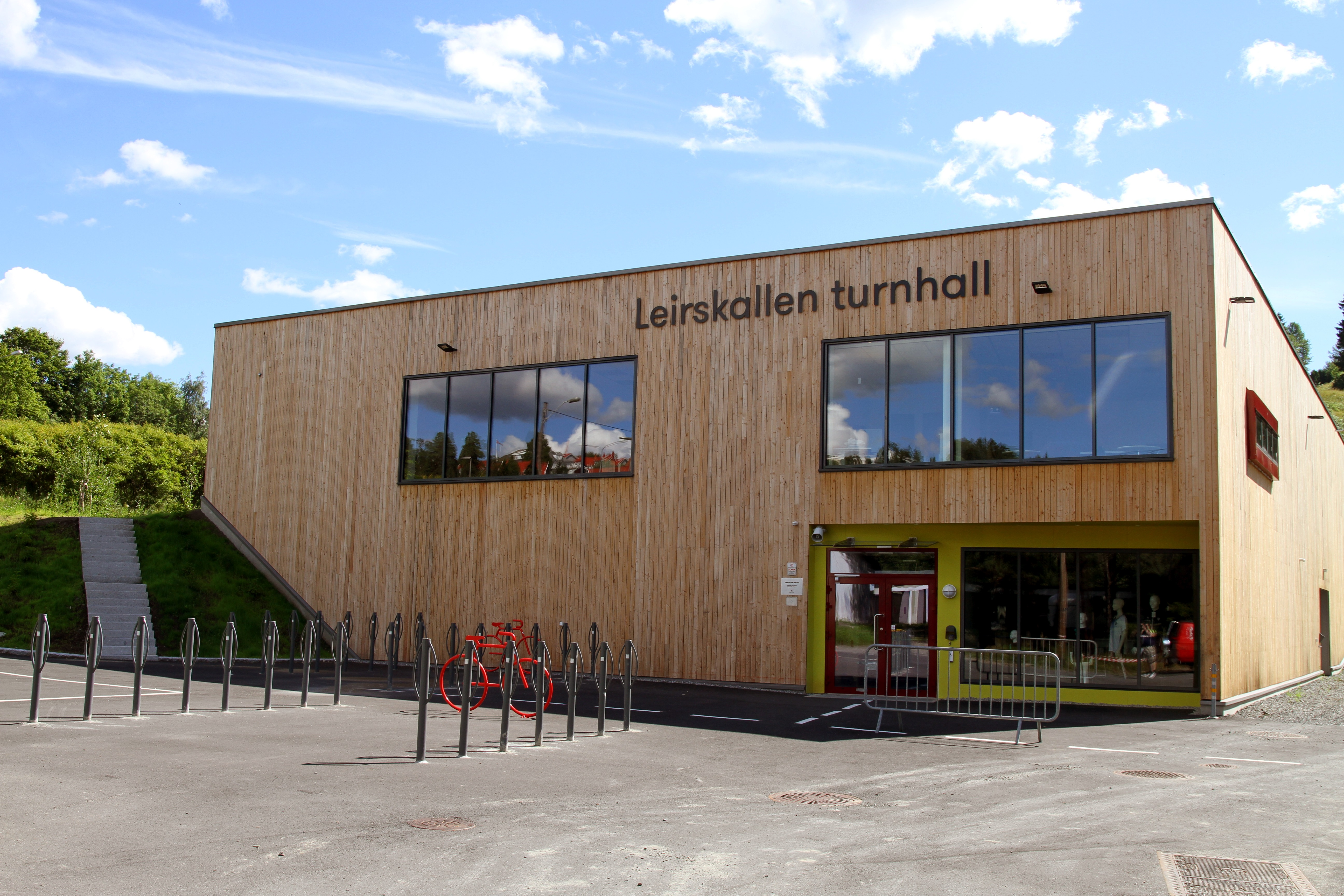 Leirskallen turnhall i Oslo.